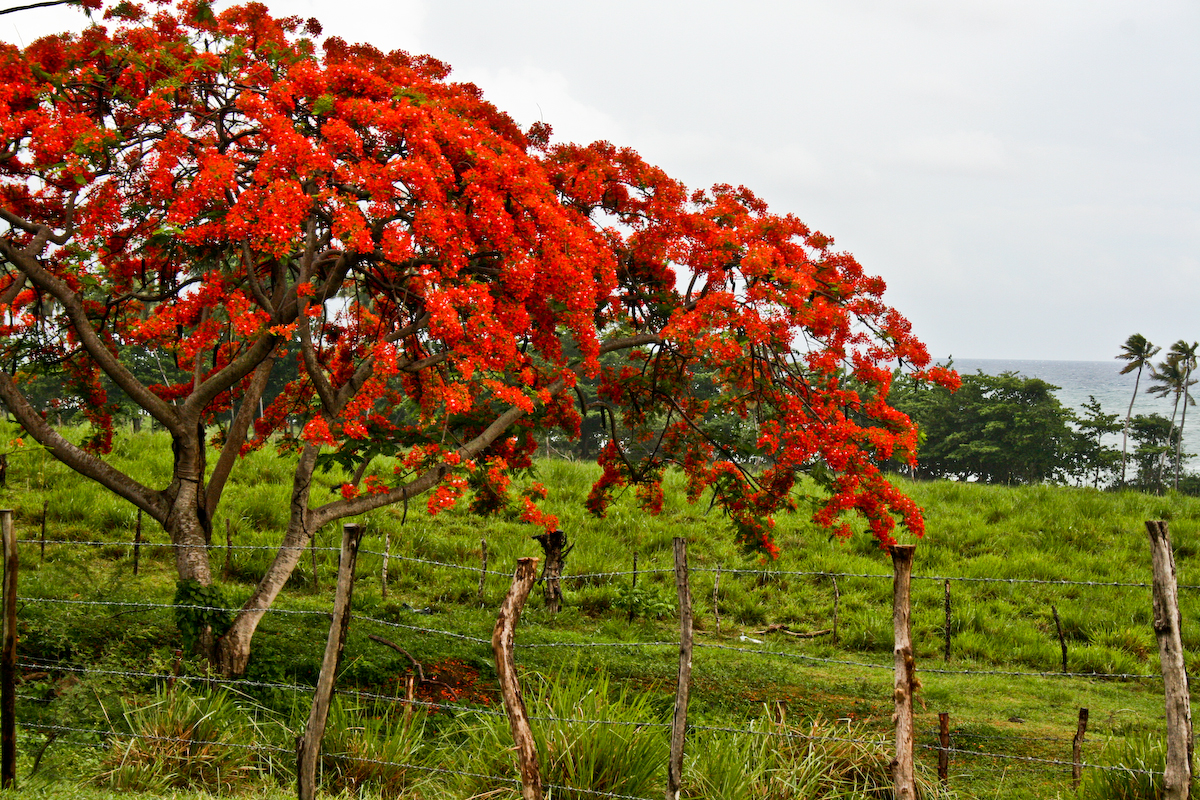 Flamboyan en Puerto Rico